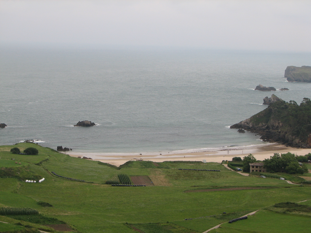 Playa de Toranda en Niembro (Asturias)